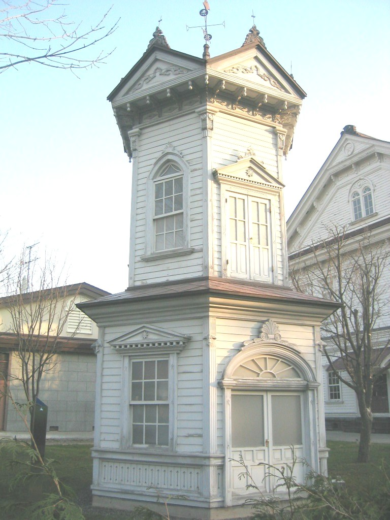 投稿者が撮影 撮影年月日：2010年5月5日 北海道旭川市の旧旭川偕行社前にある六角堂